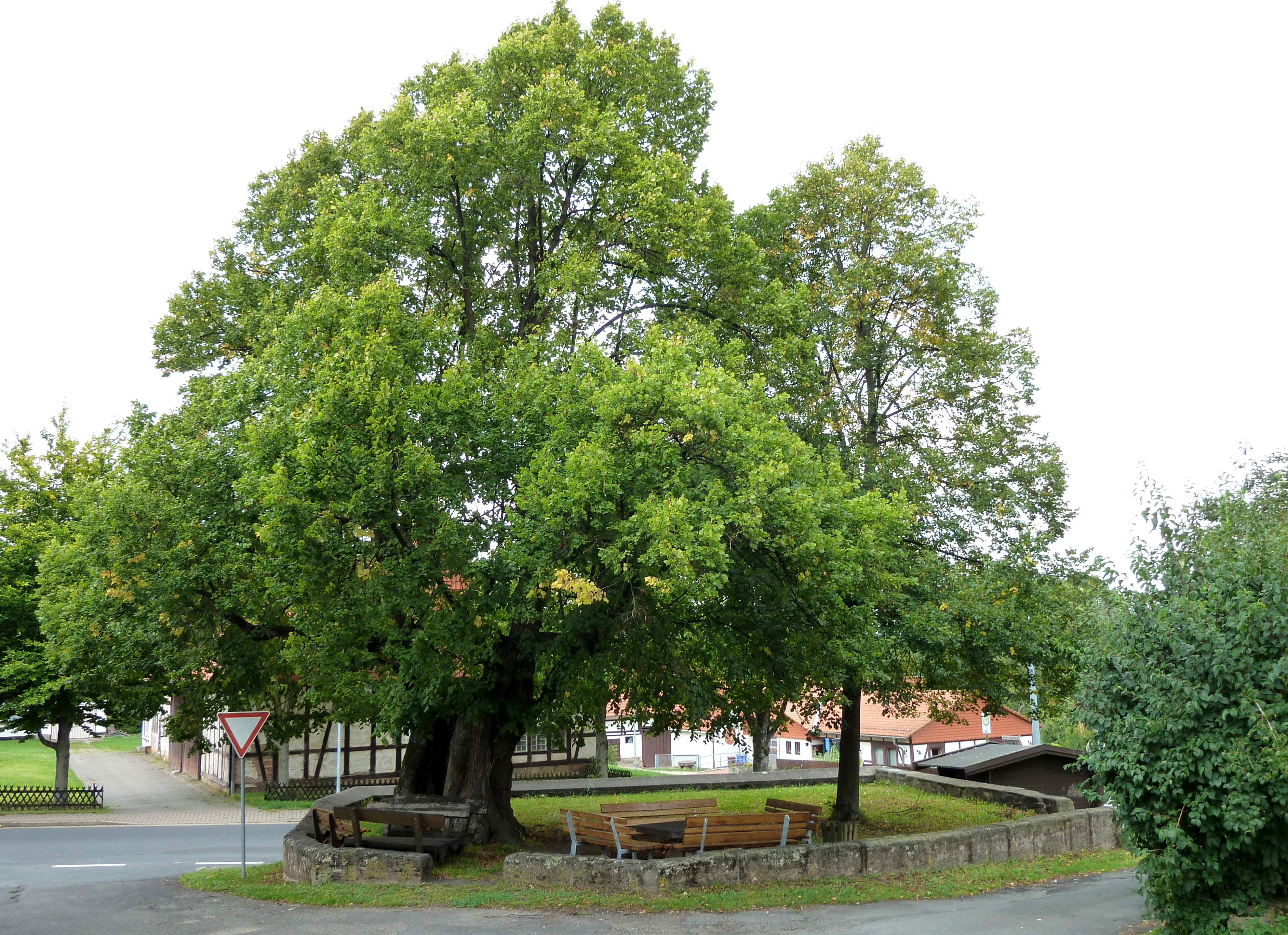 Tieplatz in Deiderode, Gemeinde Friedland, Niedersachsen